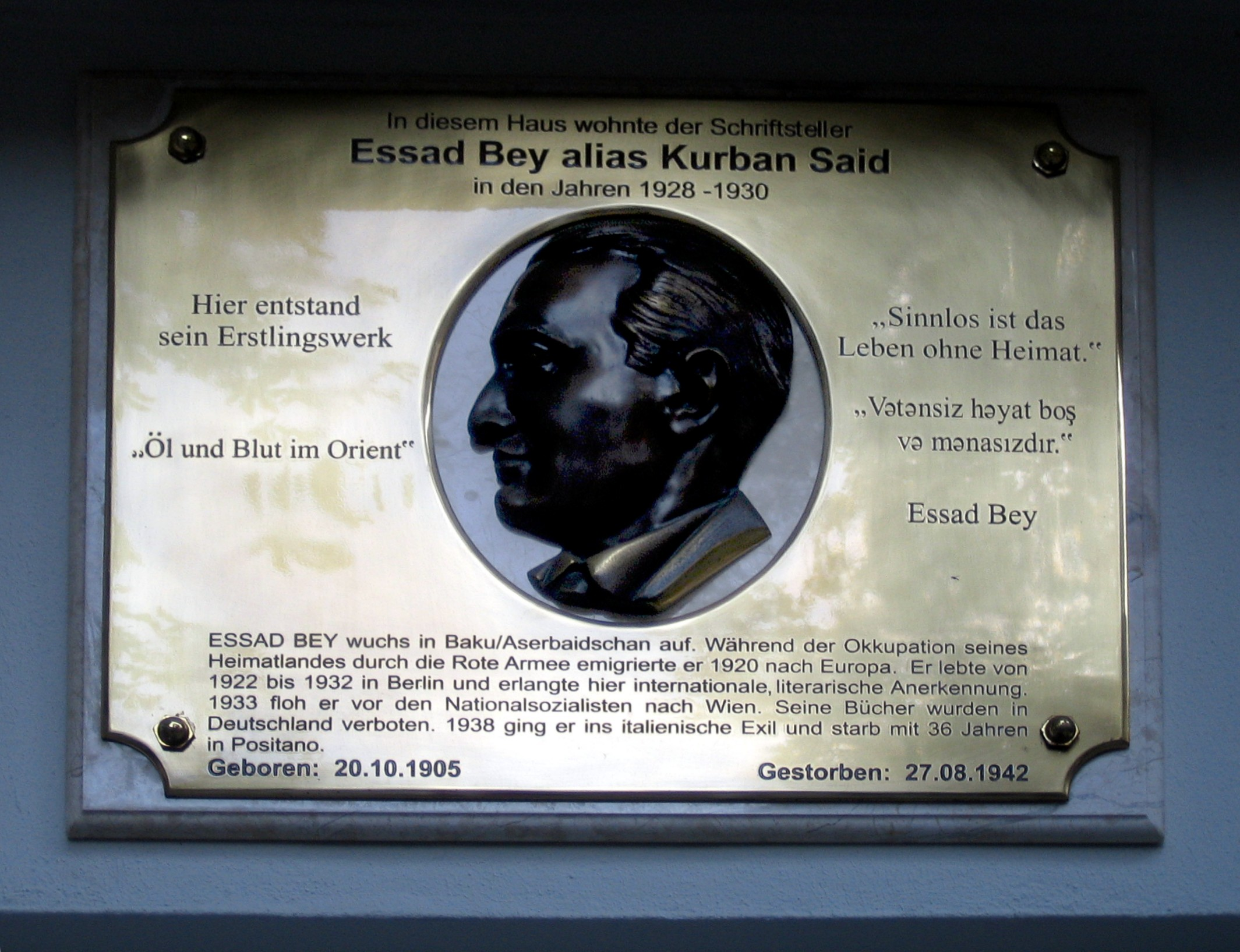 Gedenktafel für den Schriftsteller Essad Bey in Berlin, Fasanenstraße 72.